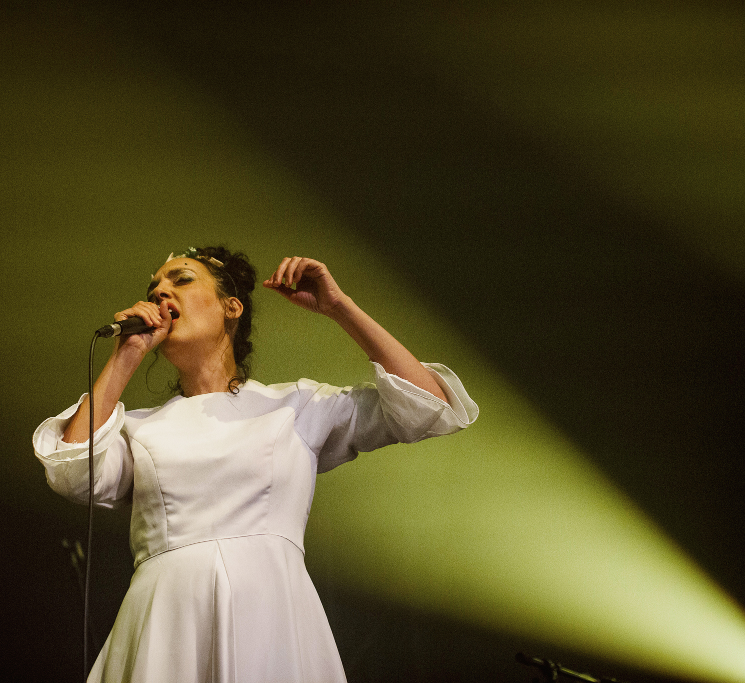 ויקטוריה חנה בהופעה בקרקוב, 27/06/2018